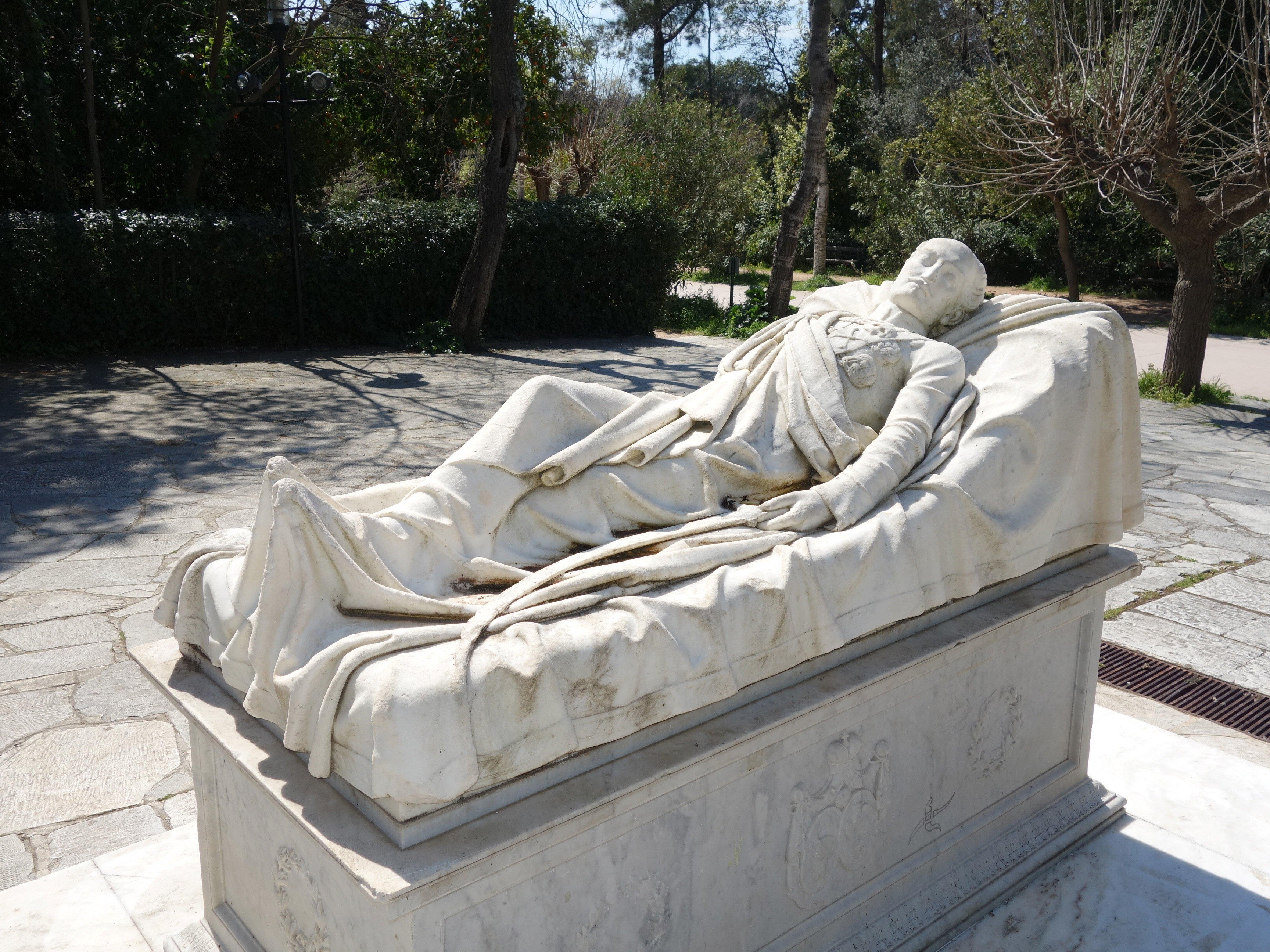 Mvskoke: Το μνημείο του Αλέξανδρου Υψηλάντη στο Πεδίον του Άρεως, στο οποίο έχουν αποτεθεί και τα οστά του. Αποτελεί το μοναδικό δείγμα ανδρικής μορφής πάνω σε σαρκοφάγο, έργο του γλύπτη Λ. Δρόση (1869) σε σχέδιο του Χρ. Χάνσεν(1842 .Στον χώρο του Πεδίου το μνημείο μεταφέρθηκε το 1964, οπότε έγινε και η μετακομιδή των οστών του Υψηλάντη από τη Βιέννη στην Αθήνα.